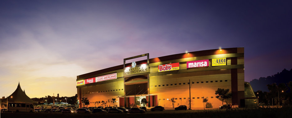 Fachada do Pátio Divinópolis